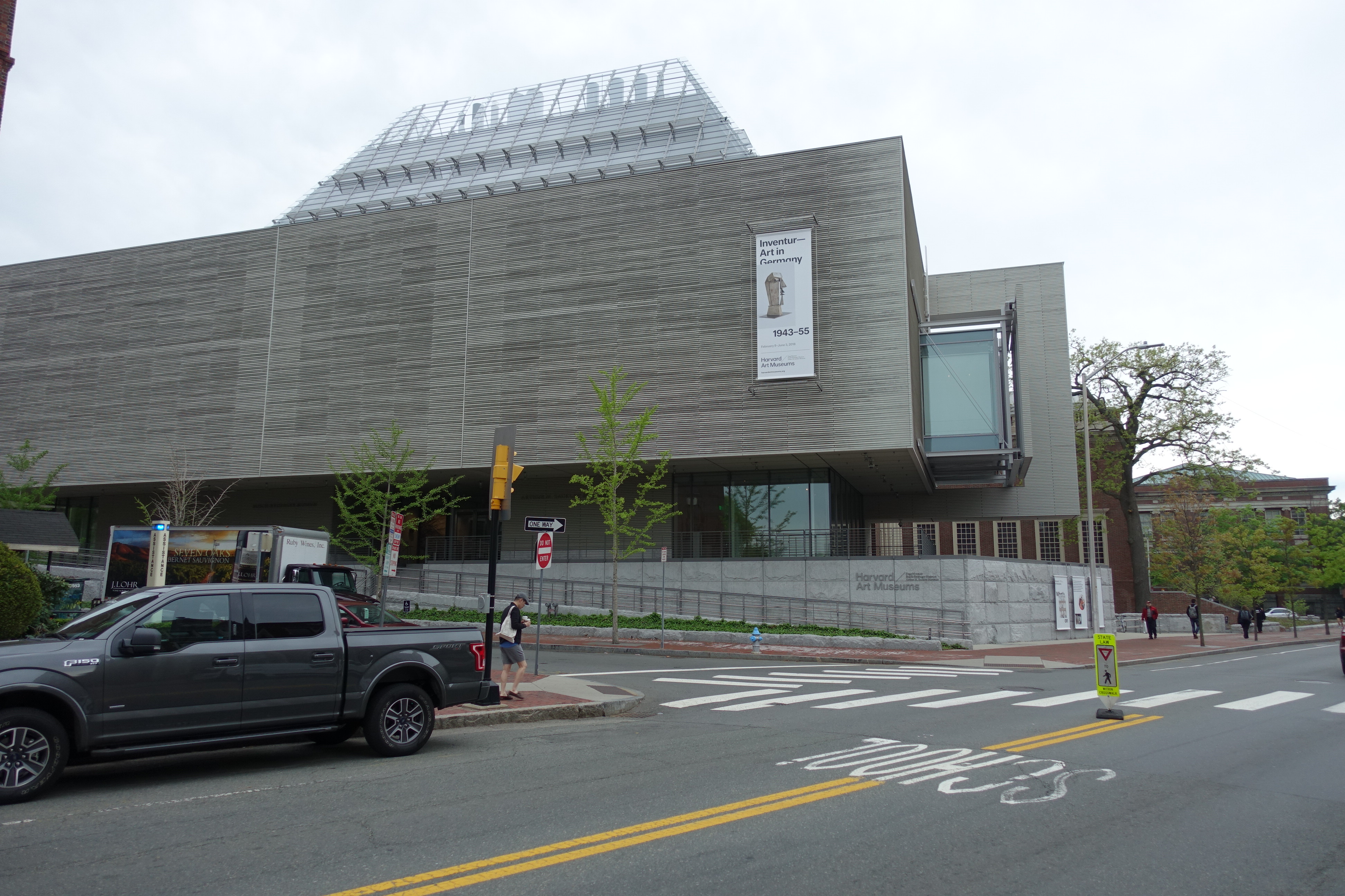 Neubau von Renzo Piano und Eingang zu den Harvard Art Museen in Cambridge, Massachusetts, USA